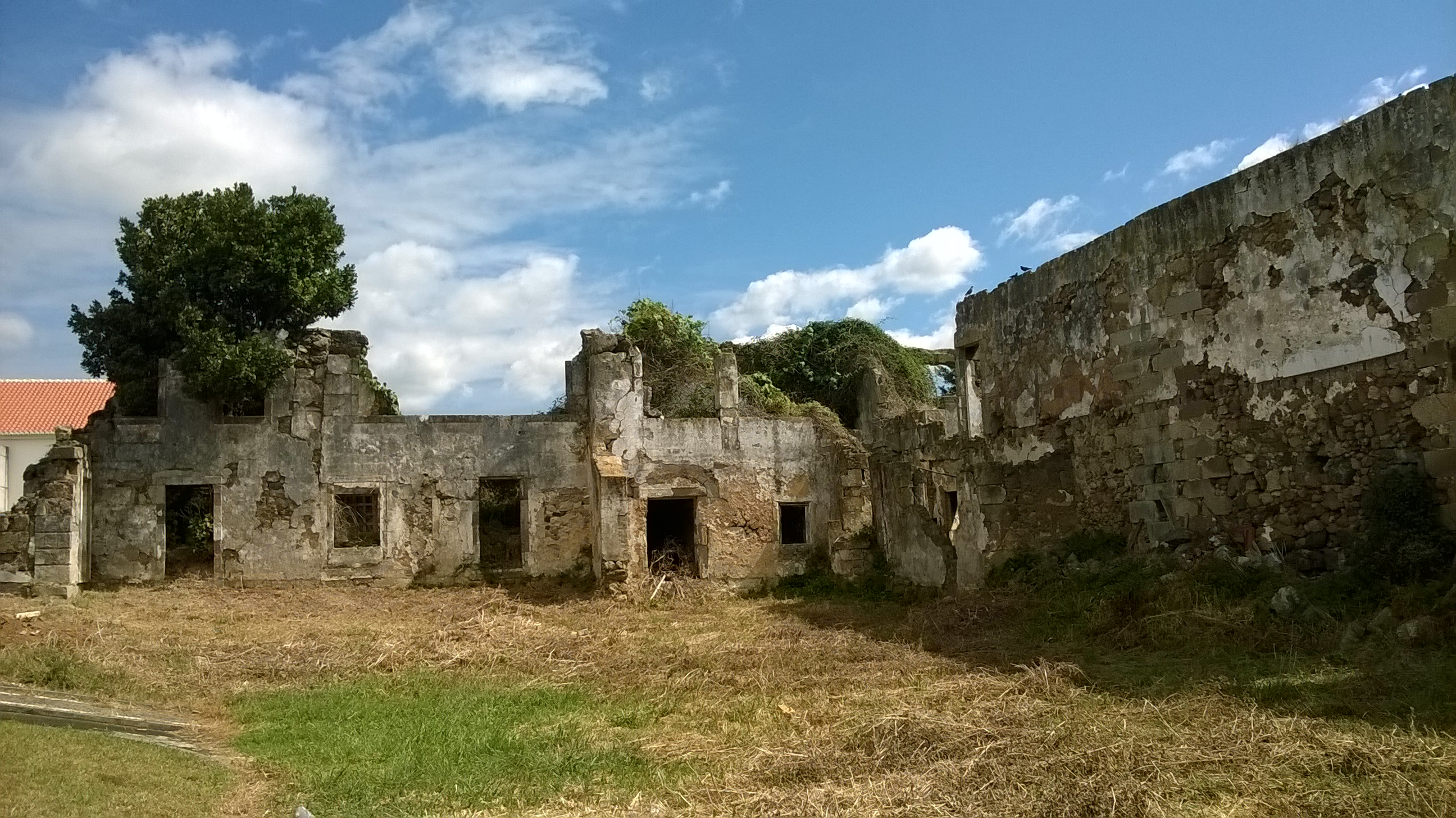 Convento de Nossa Senhora da Conceição, freguesia de Nossa Senhora da Conceição, concelho de Angra do Heroísmo, Ilha Terceira, Região Autónoma dos Açores.